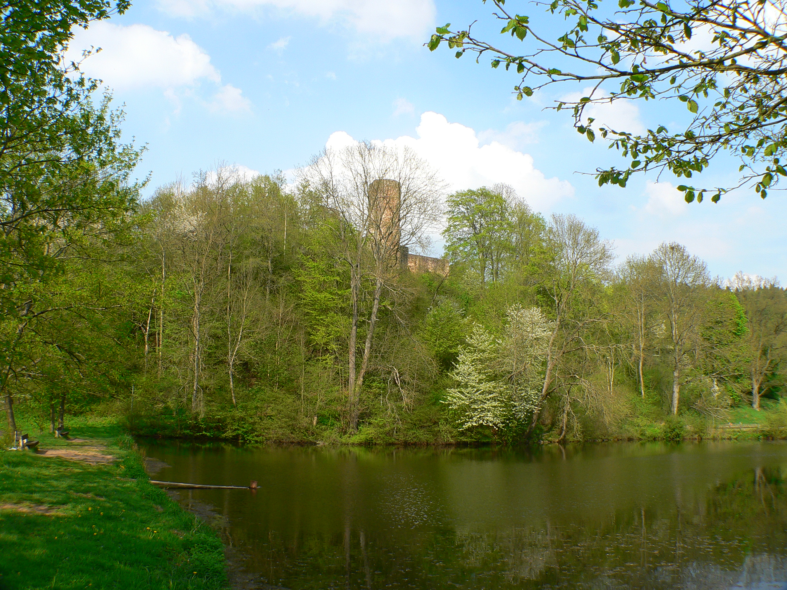 Burgruine Wallenstein in Knüllwald-Wallenstein, Hessen, Regierungsbezirk Kassel, Schwalm-Eder-Kreis